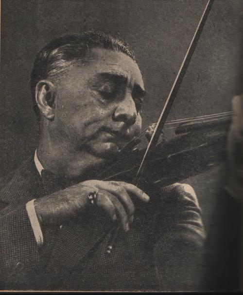 Grigoras Dinicu